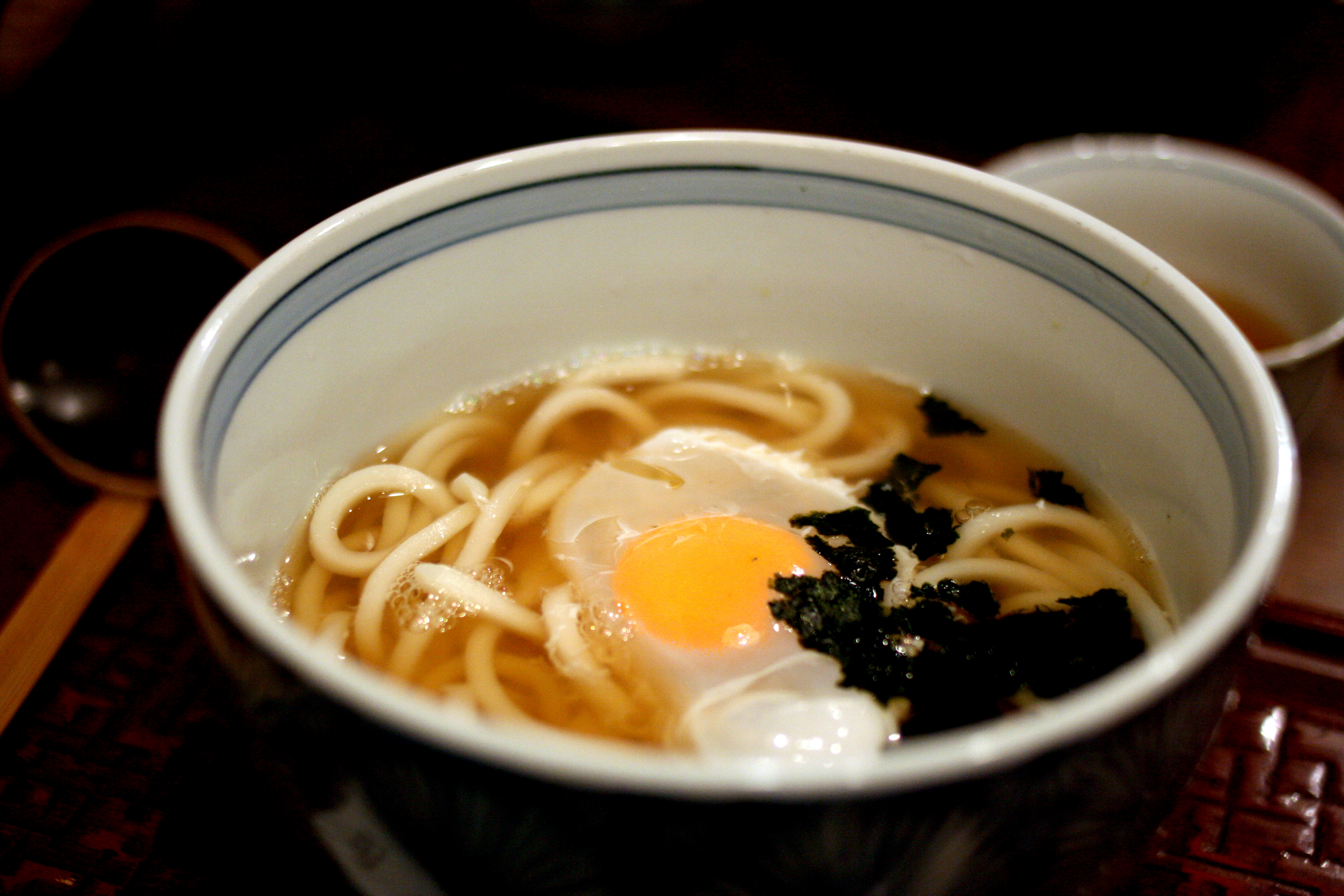 月見うどん（京都市中京区新京極通四条上ル付近）